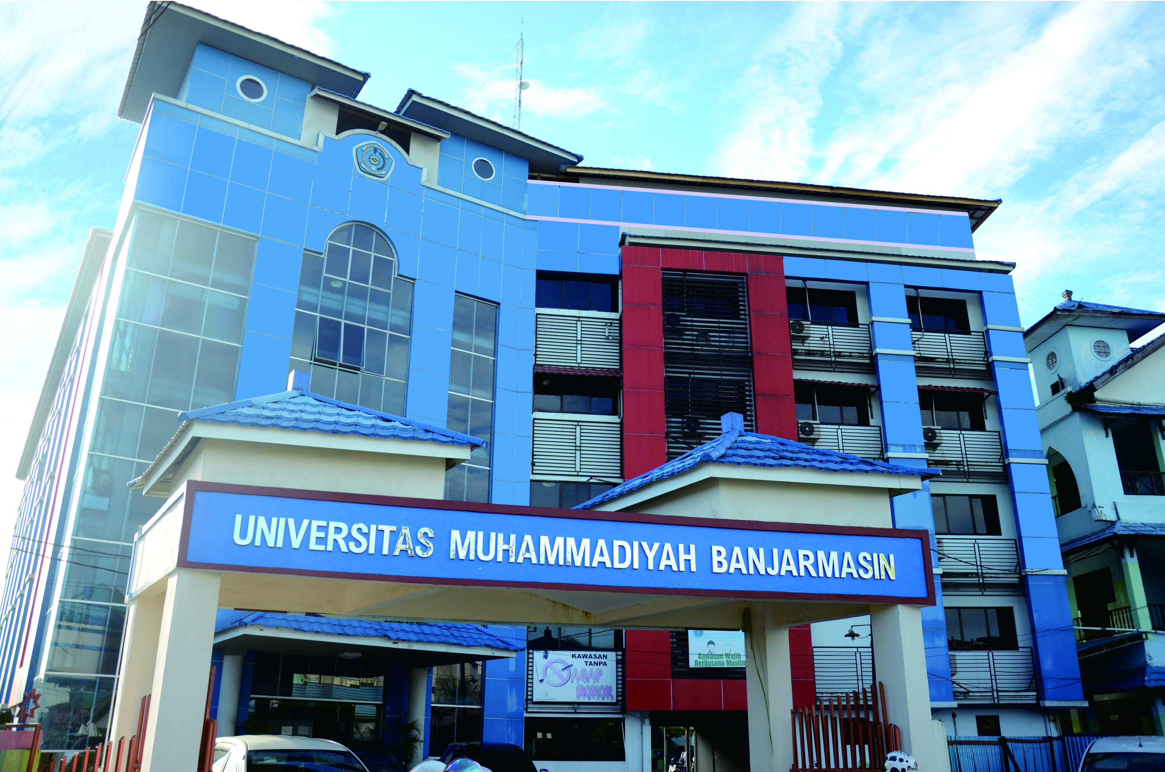 Kampus 1 Universitas Muhammadiyah Banjarmasin, beralamat di Jl. S. Parman Komp. Rumah Sakit Islam Banjarmasin, Kel. Pasar Lama, Kec. Banjarmasin Tengah, Kota Banjarmasin, Kalimantan Selatan 70114